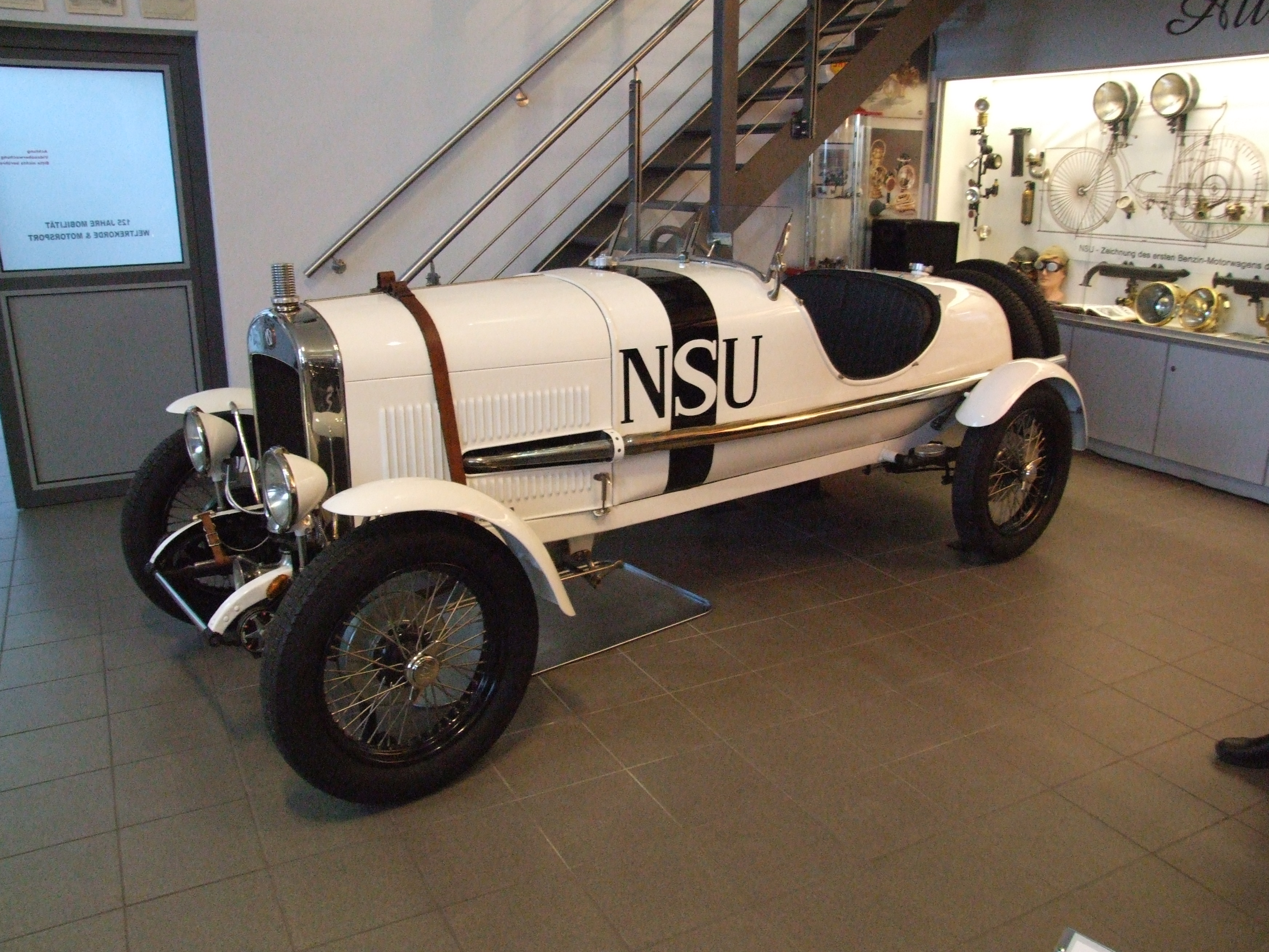 NSU 5/25 PS, Baujahr 1923-1925, 40 PS, 4-Zylinder Kompressor mit Sackzylinder, 1332 ccm, siegte in der 1,5 l-Klasse 1923,1924,1925 beim AVUS-Rennen in Berlin; Museum Autovision, Altlußheim, Deutschland